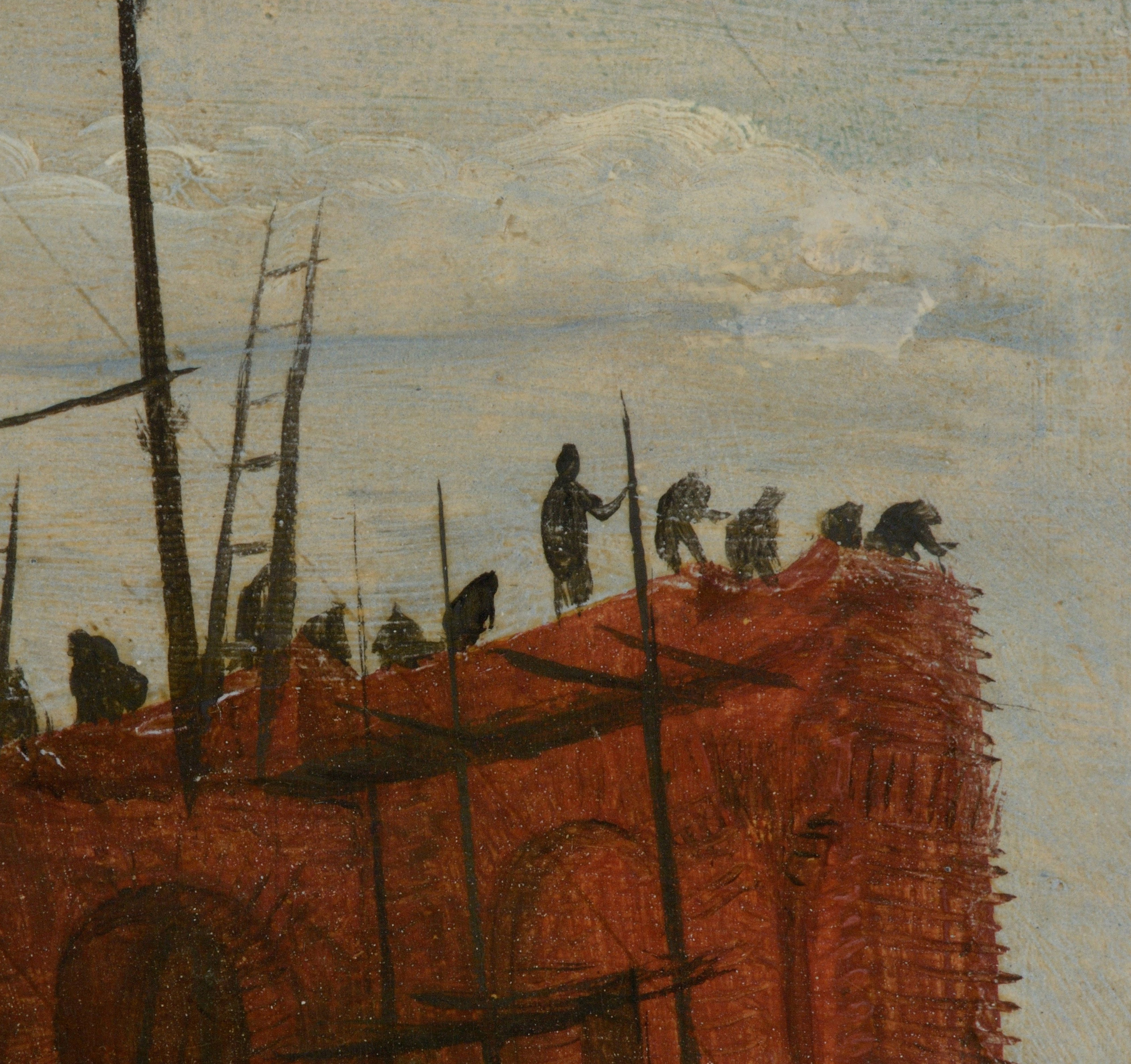 Ausschnitt aus dem Großen Turmbau zu Babel in Wien